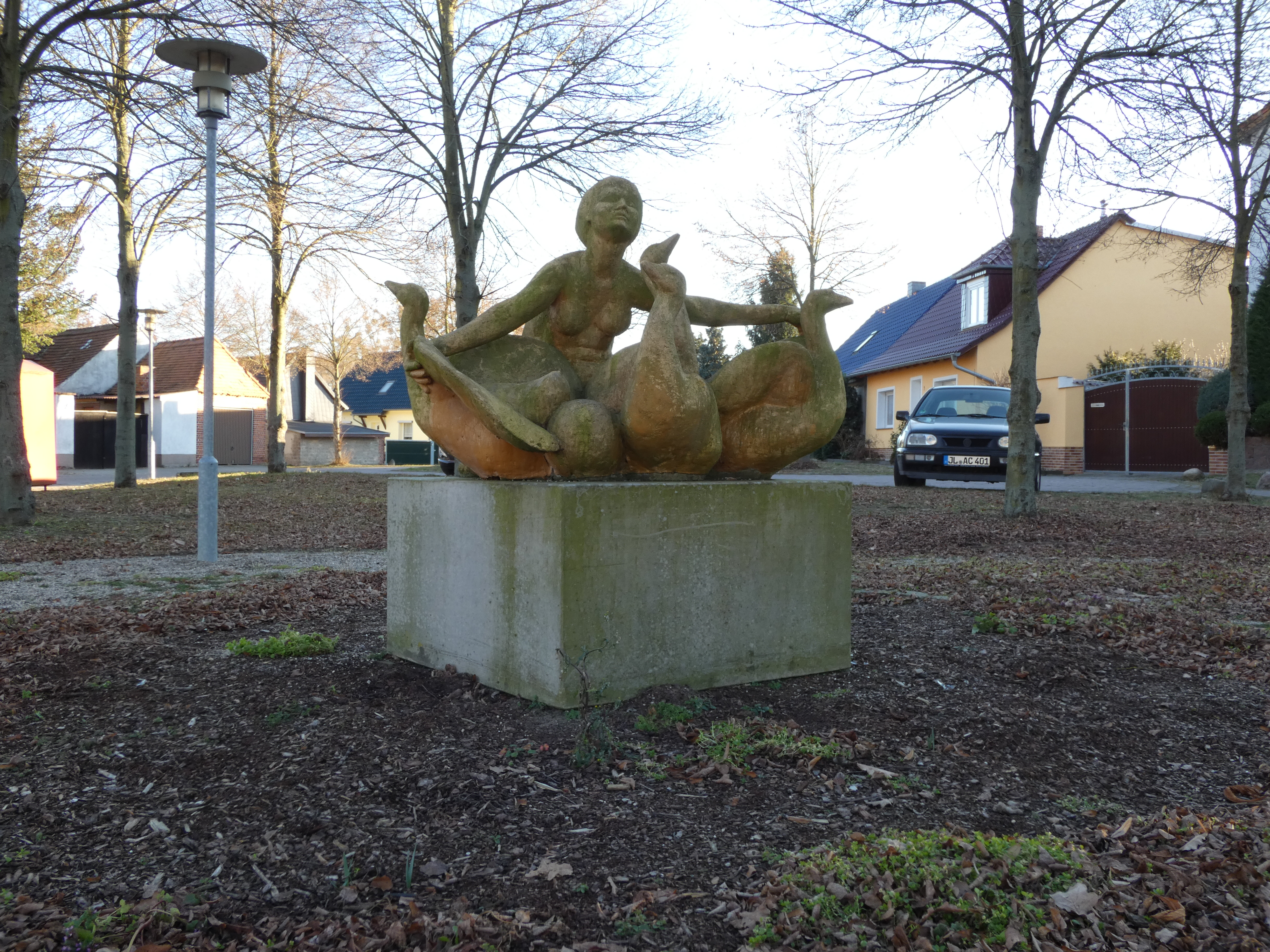 Skulptur Frau mit Glück, aus Ton - gebrochen, gebrannt, gefügt - immer fliehend da. Dirk Harms 1996, Dorfstraße, Ortsteil Grabow, Möckern